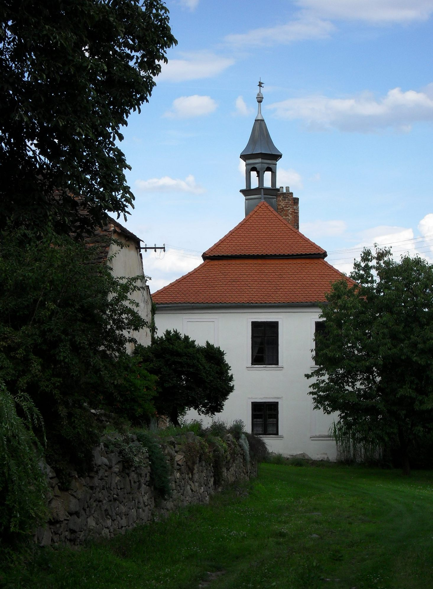 Barokní zámeček z let 1723-1729 ve Vidlákové Lhotě (Benešov)